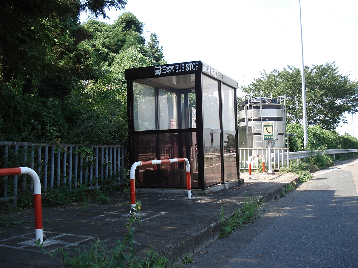 東北自動車道三本木パーキングエリア（下り線）敷地内に設置されている三本木バスストップ